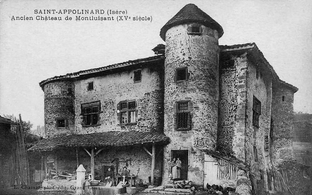 chateau de Montluisant, Saint-Appolinard, Isère, France.